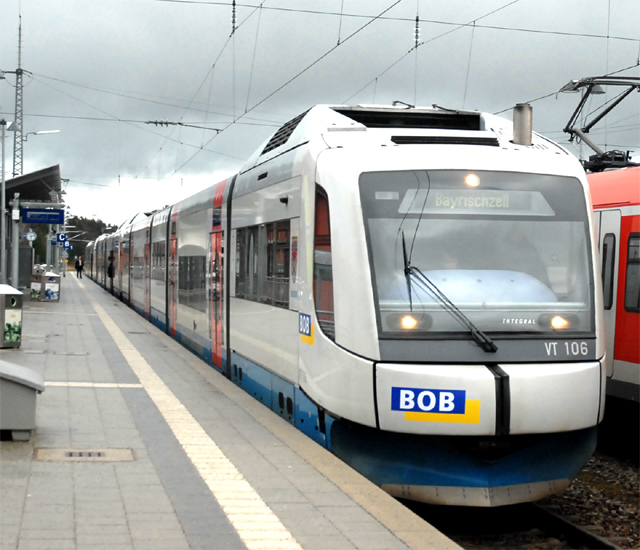 Bayerische Oberlandbahn VT 106 naar Bayrischzell te Holzkirchen.